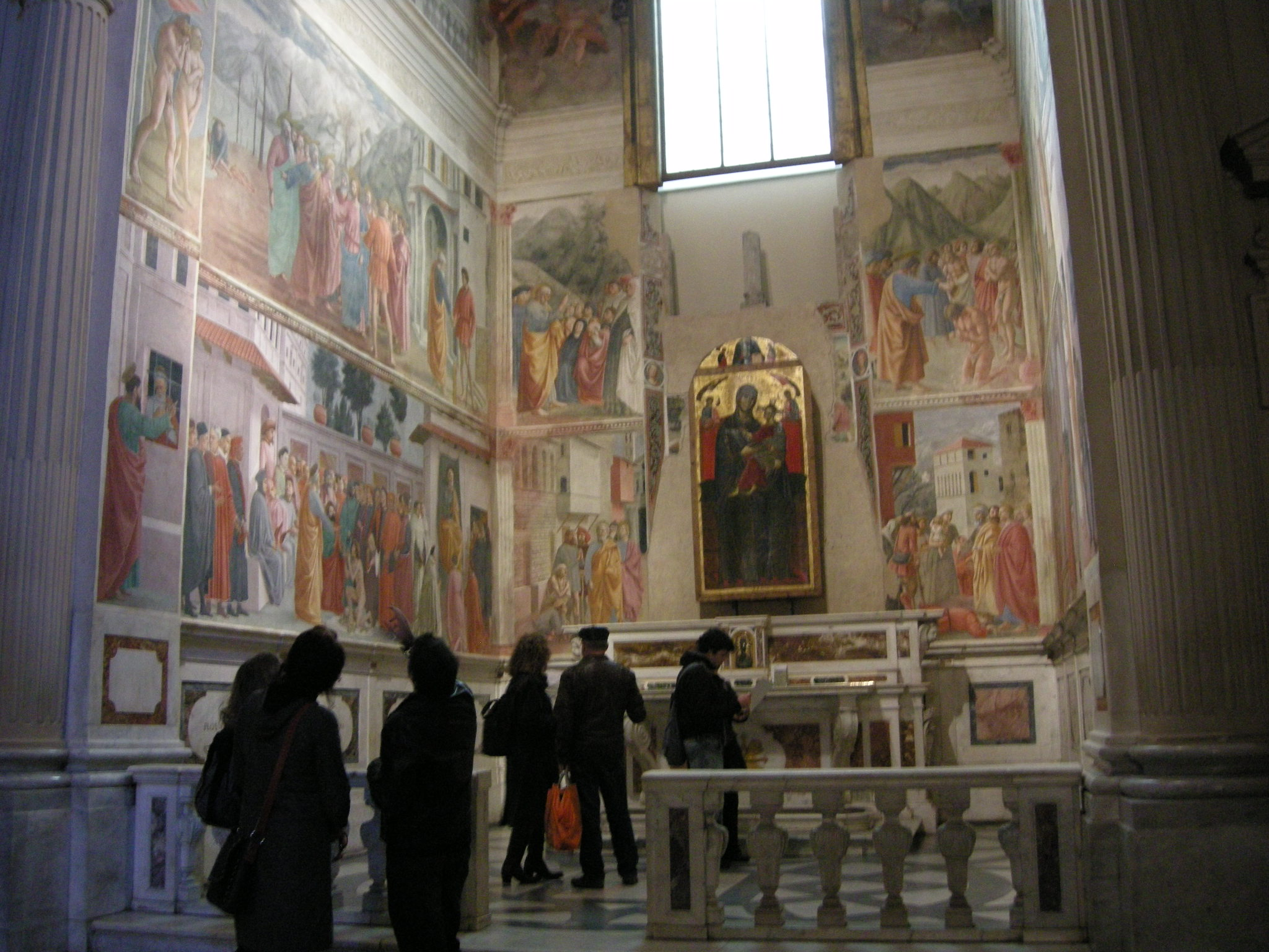 Cappella brancacci 02